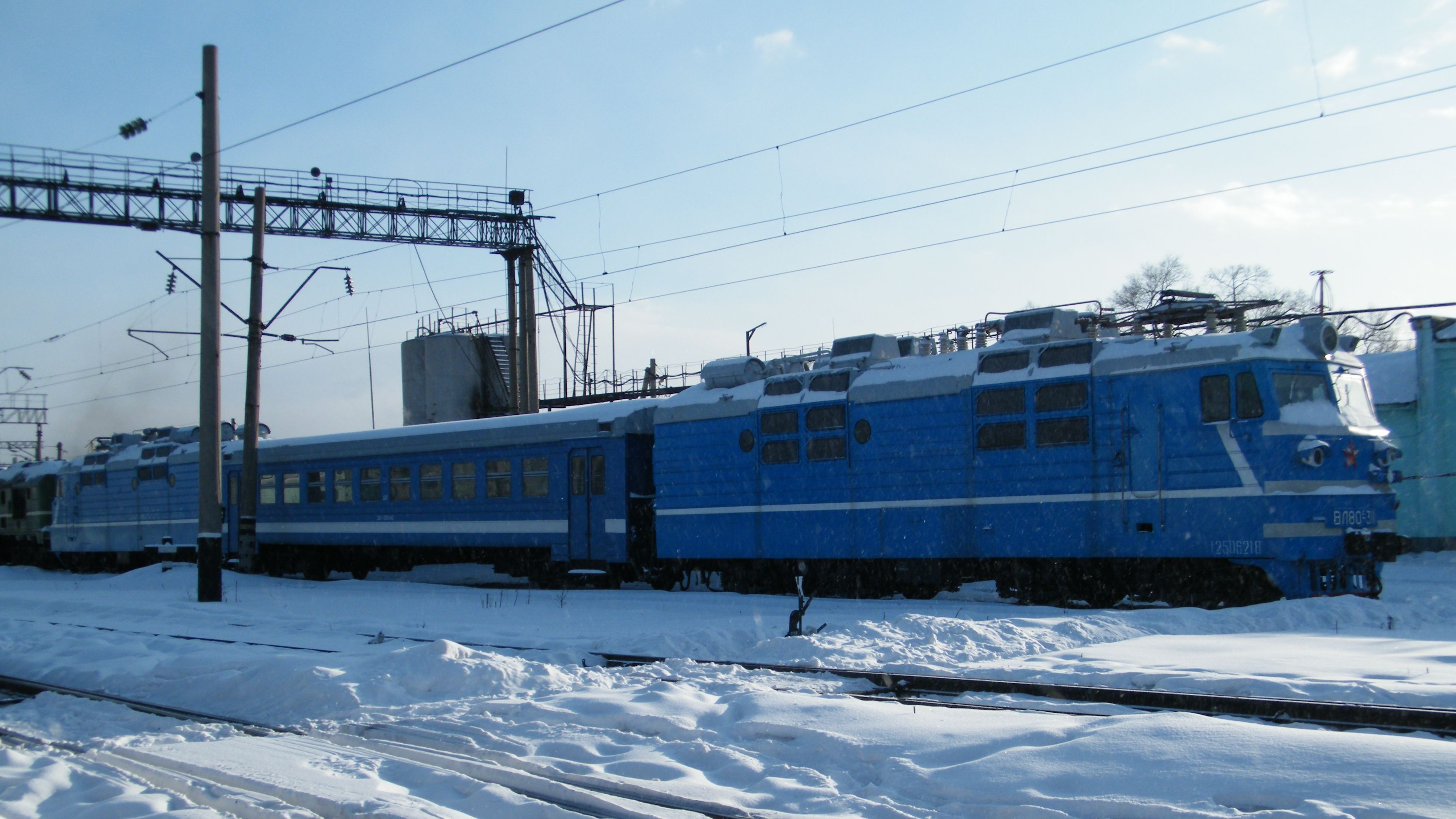 Остатки электропоезда ЭД1-004 с электровозом ВЛ-80С-311 в локомотивном депо Уссурийск